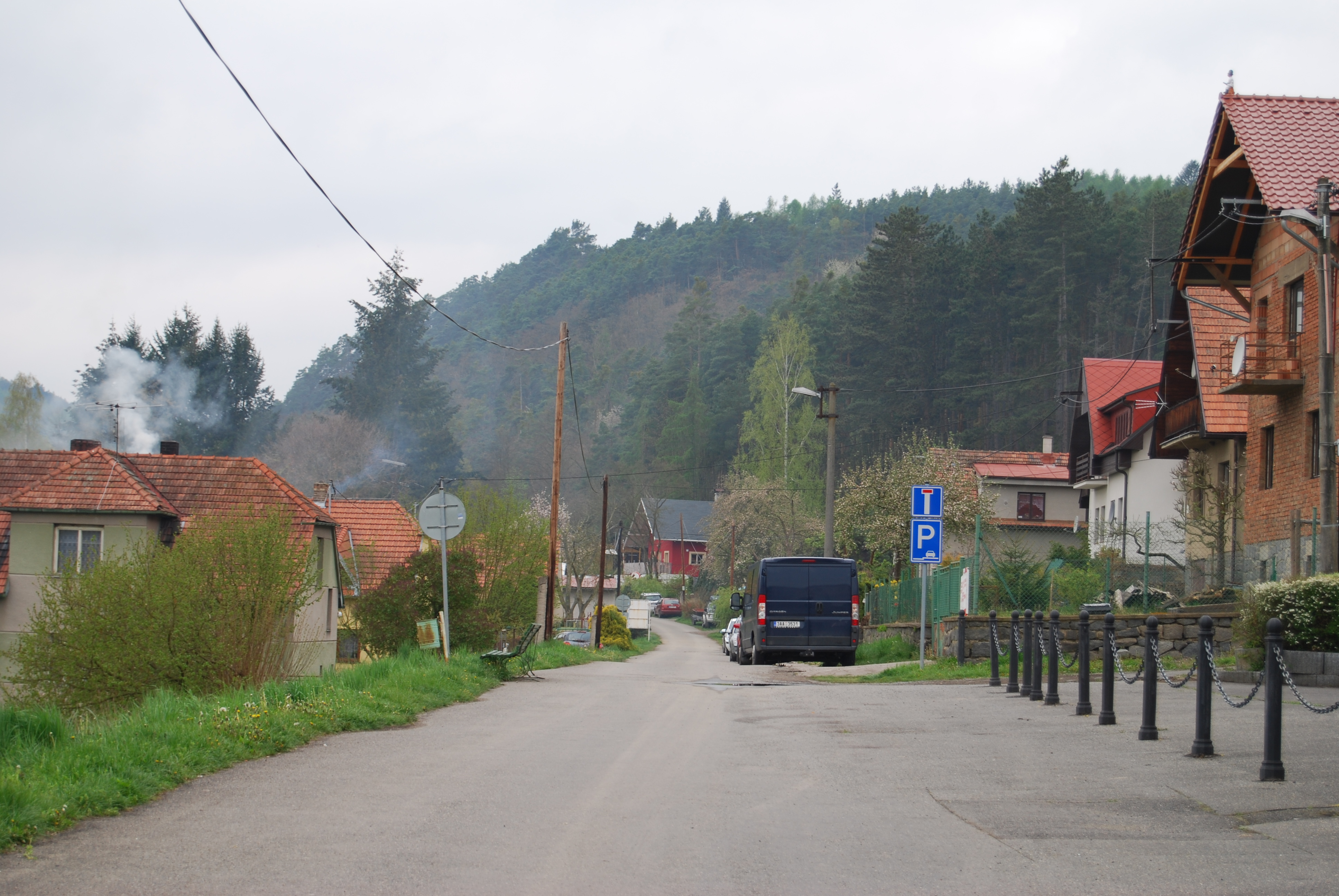 Županovice (okres Příbram). Kraj Středočeský. Česká republika. - Google Maps - Google Earth